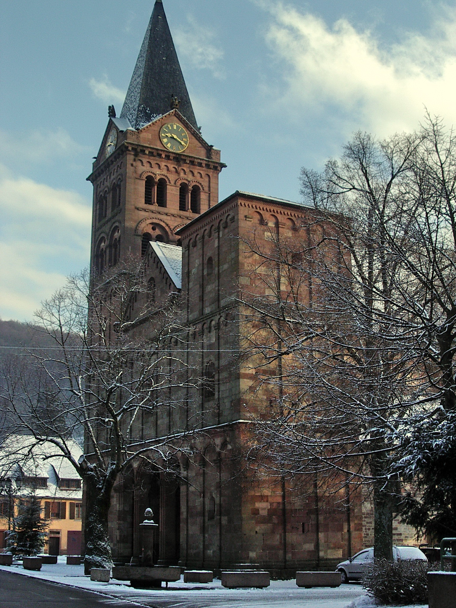 La collégiale de Lautenbach (Alsace, France) en hiver.